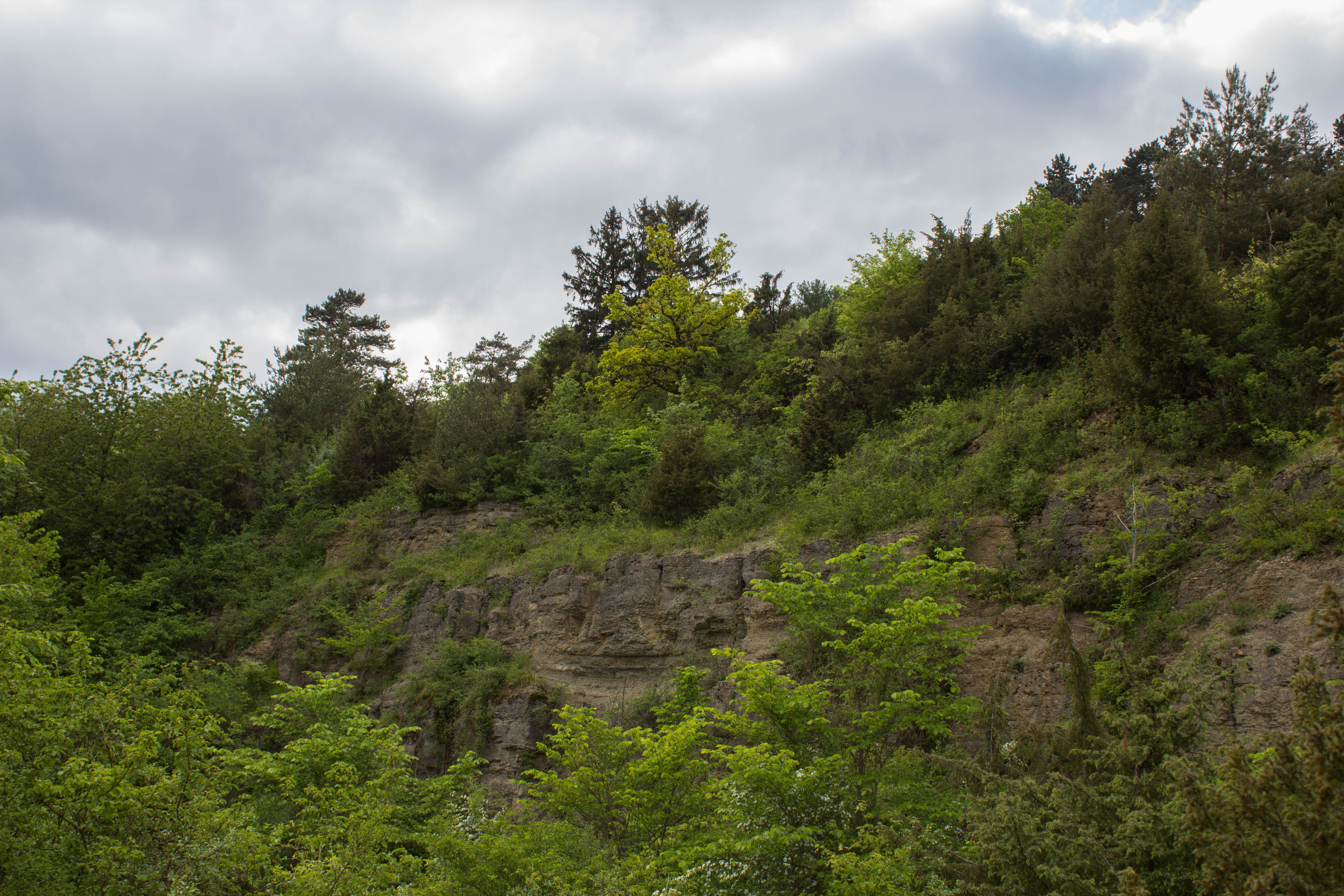 Naturschutzgebiet „Weinberg bei Steinau“, Steinau an der Straße; auf dem Weg nach oben.